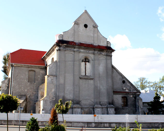 Brześć Kujawski - kościół klasztorny dominikanów p.w. św. Michała Archanioła, 2 poł. XIII, 2 poł. XVII w.